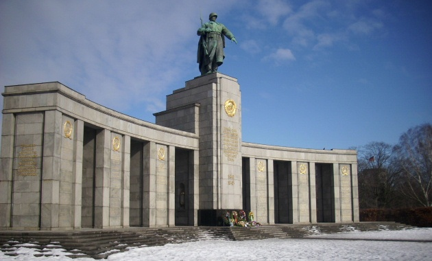 Sowjetisches Ehrenmal im Tiergarten von Westen aus gesehen